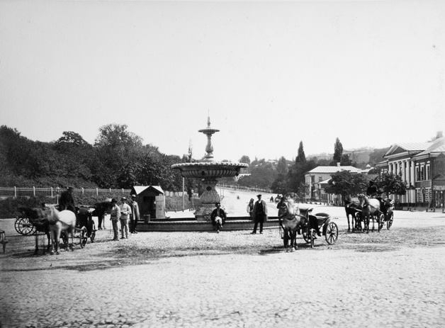 Фонтан Александра Шиле на современной Европейской площади. Фотограф: Франц де Мезер.